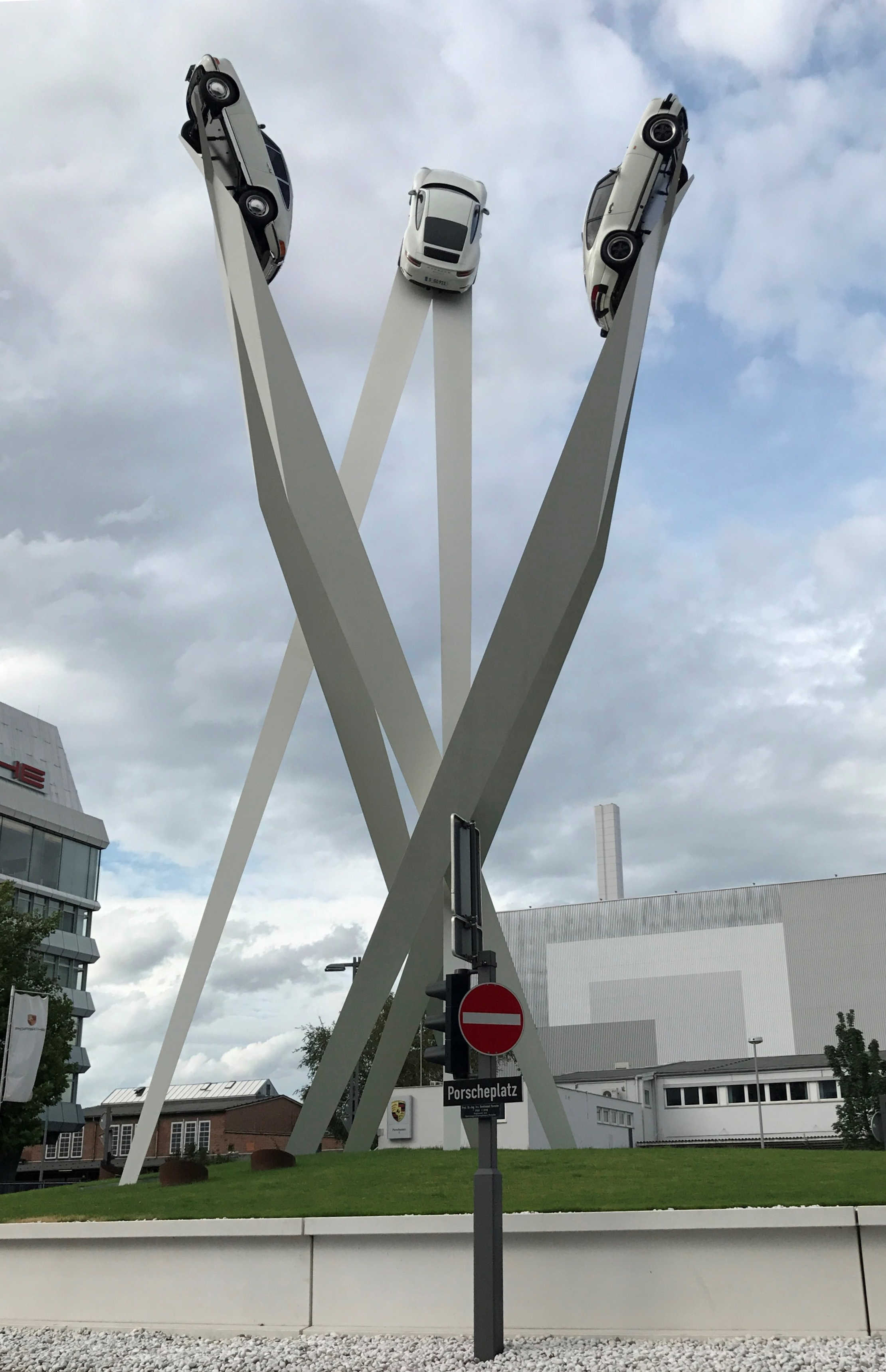 Skulptur am Porscheplatz in Stuttgart